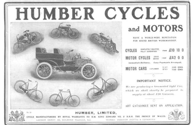 Advertentie uit 1903